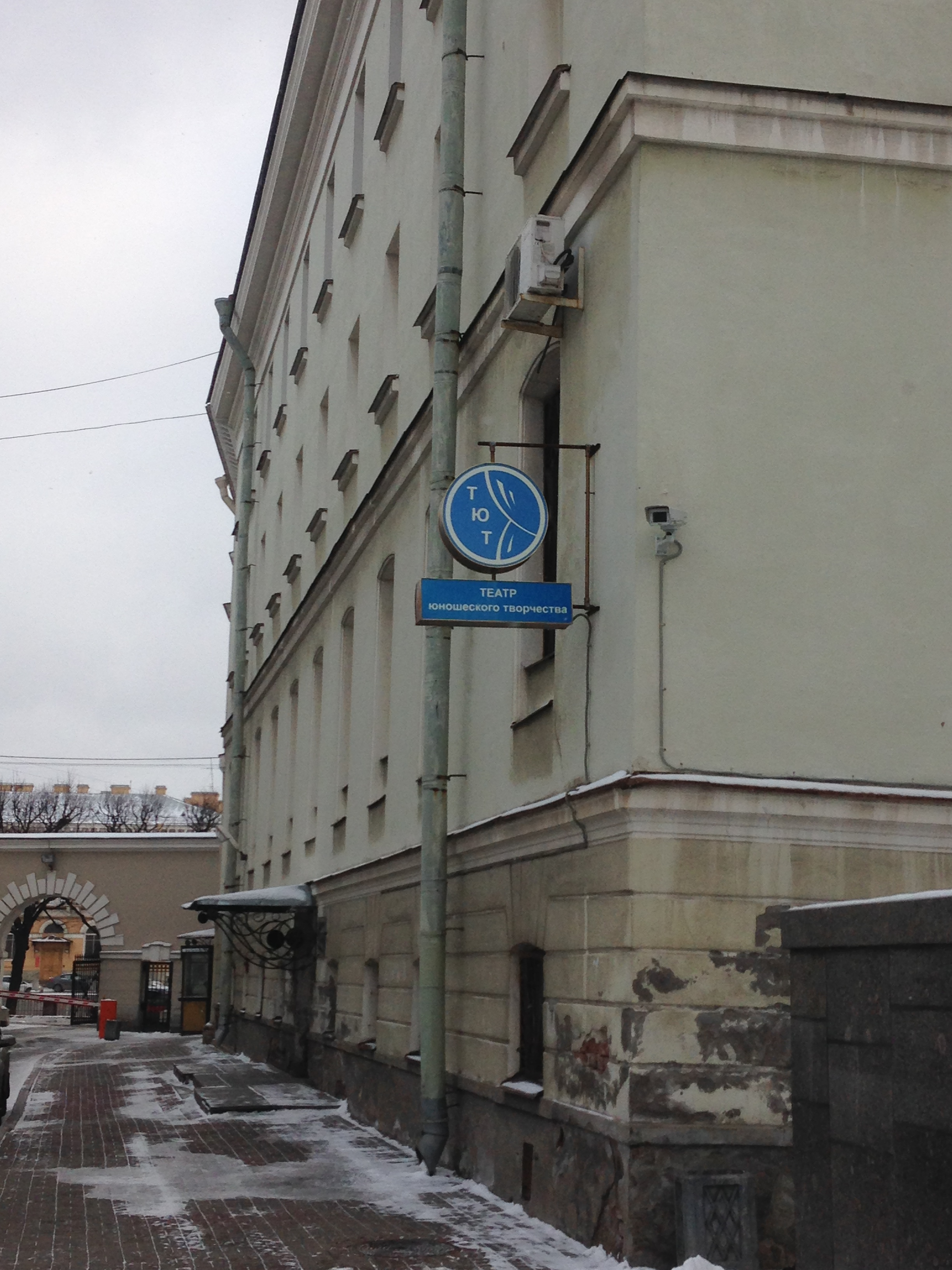 Здание Театра Юношеского Творчества 2017